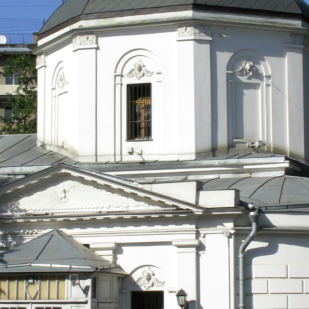 Церковь Покрова Пресвятой Богородицы на Лыщиковой горе